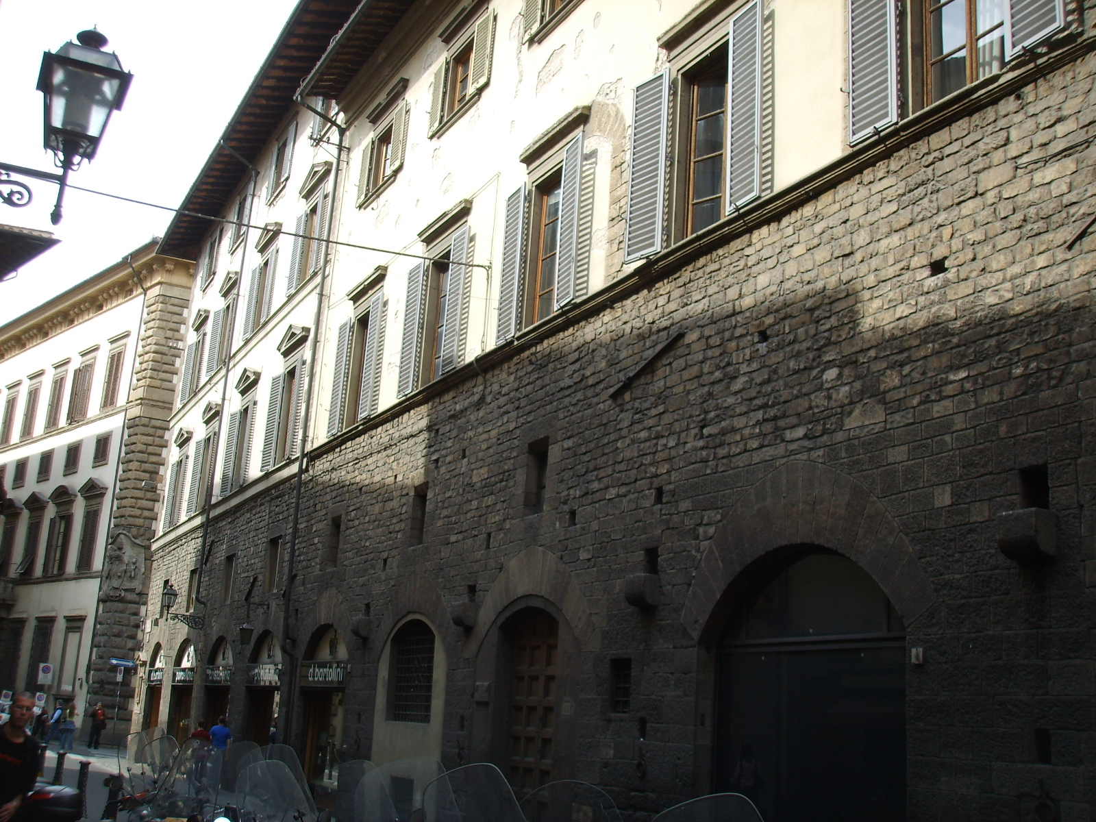 Palazzo_Pasqui in Florence